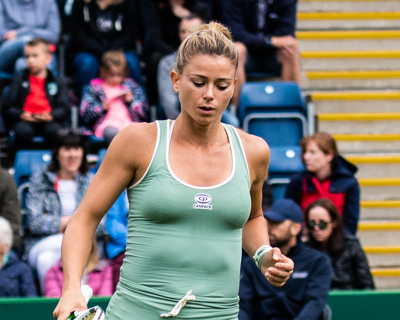 Camila Giorgi